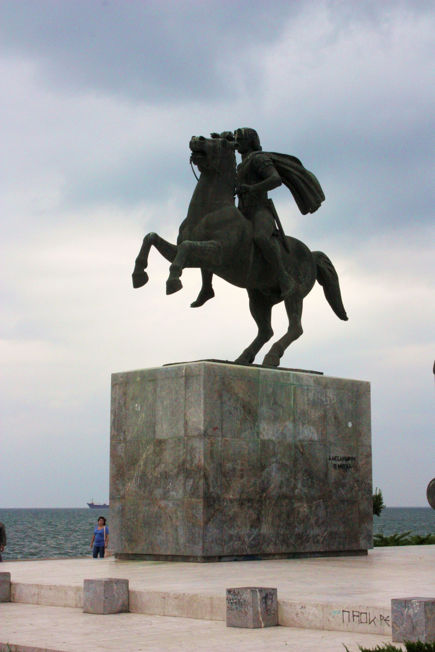 Das Denkmal Alexander des Großen in Thessaloniki